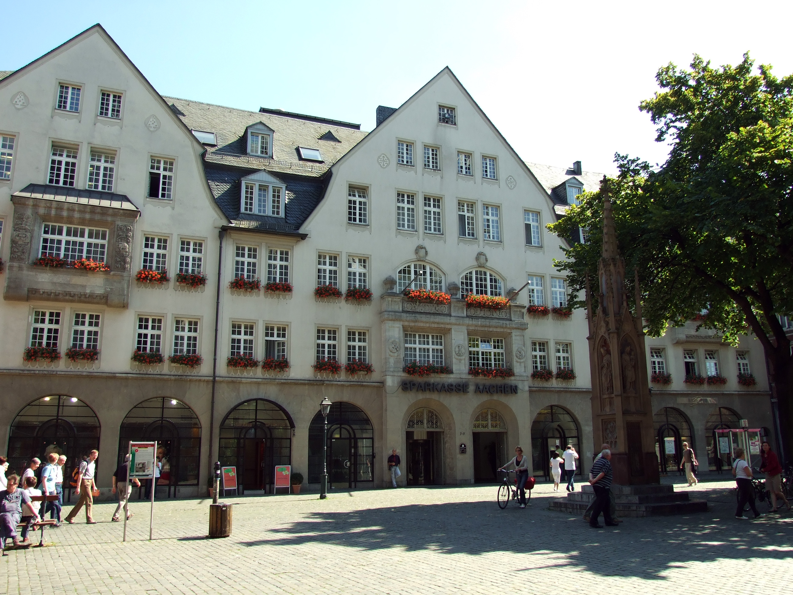 Sparkasse Aachen auf dem Münsterplatz in Aachen